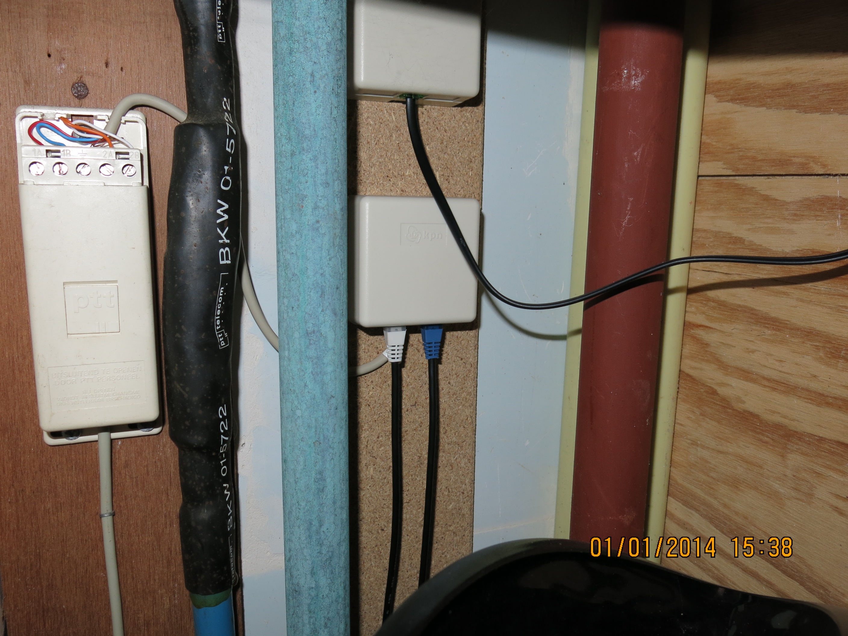 ISRA punt van KPN, met speciaal KPN aansluitdoosje voor de Y-Kabel, geschikt voor een gewone ADSL verbinding, maar vooral bedoeld voor een VDSL verbinding. Op de ISRA deksel de bekende tekst: Uitsluitend te openen door bevoegd personeel. Bij openen wordt afsluitmechanisme onherstelbaar beschadigd.